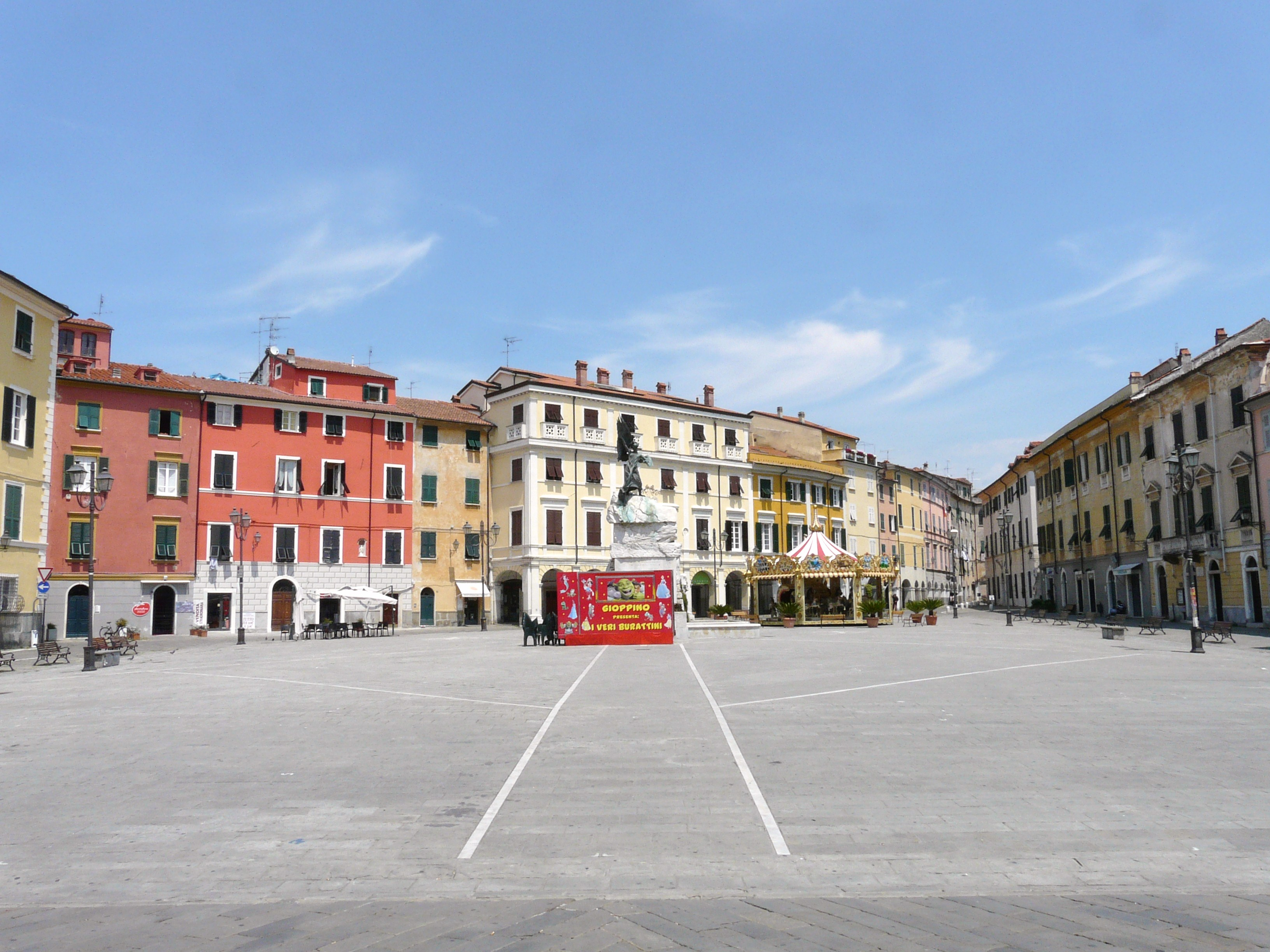 Piazza Giacomo Matteotti e monumento ai caduti della Grande Guerra, Sarzana, Liguria, Italia